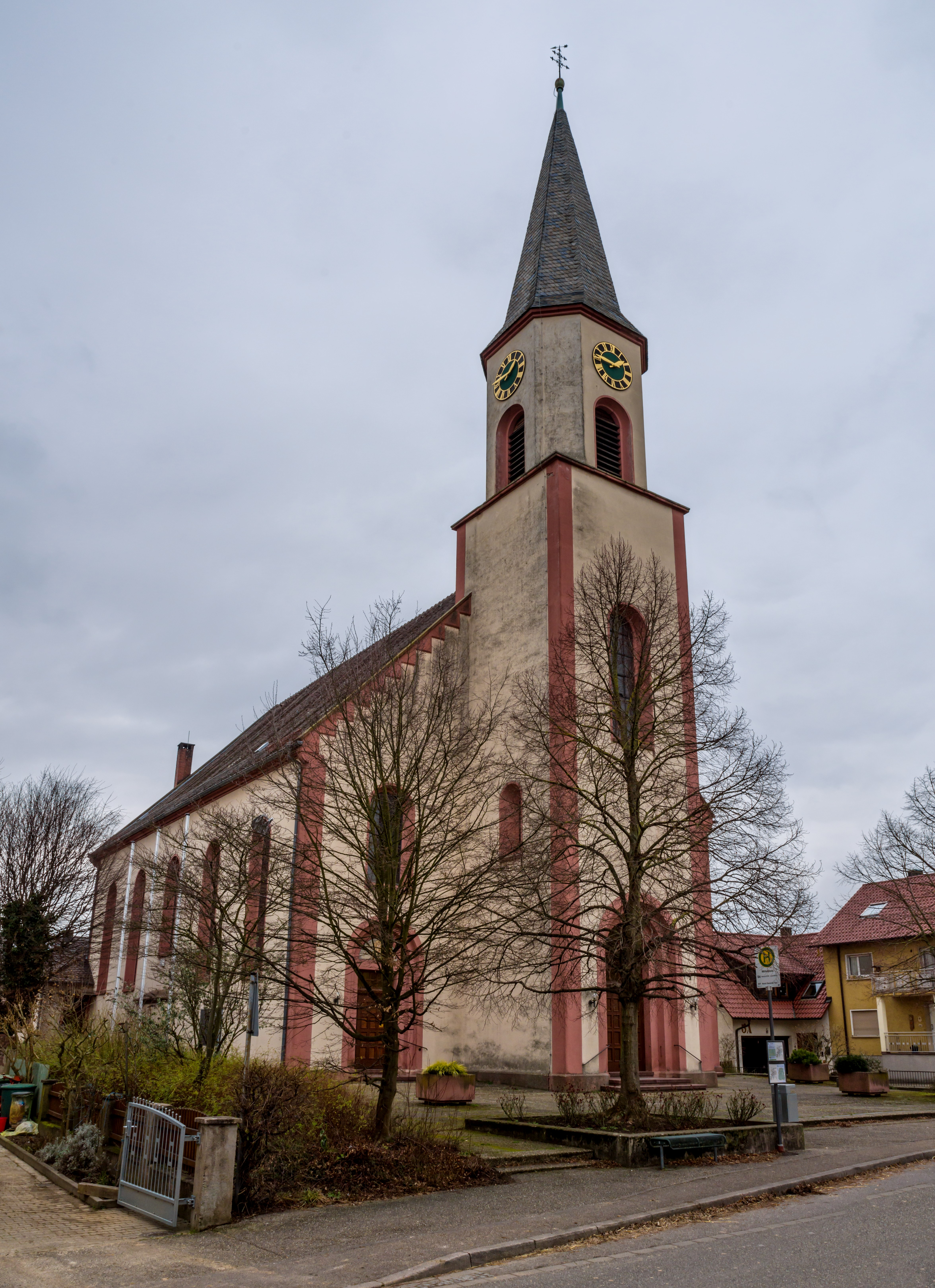 Bilder von der Tour Achern Offenburg am 10.02.2018